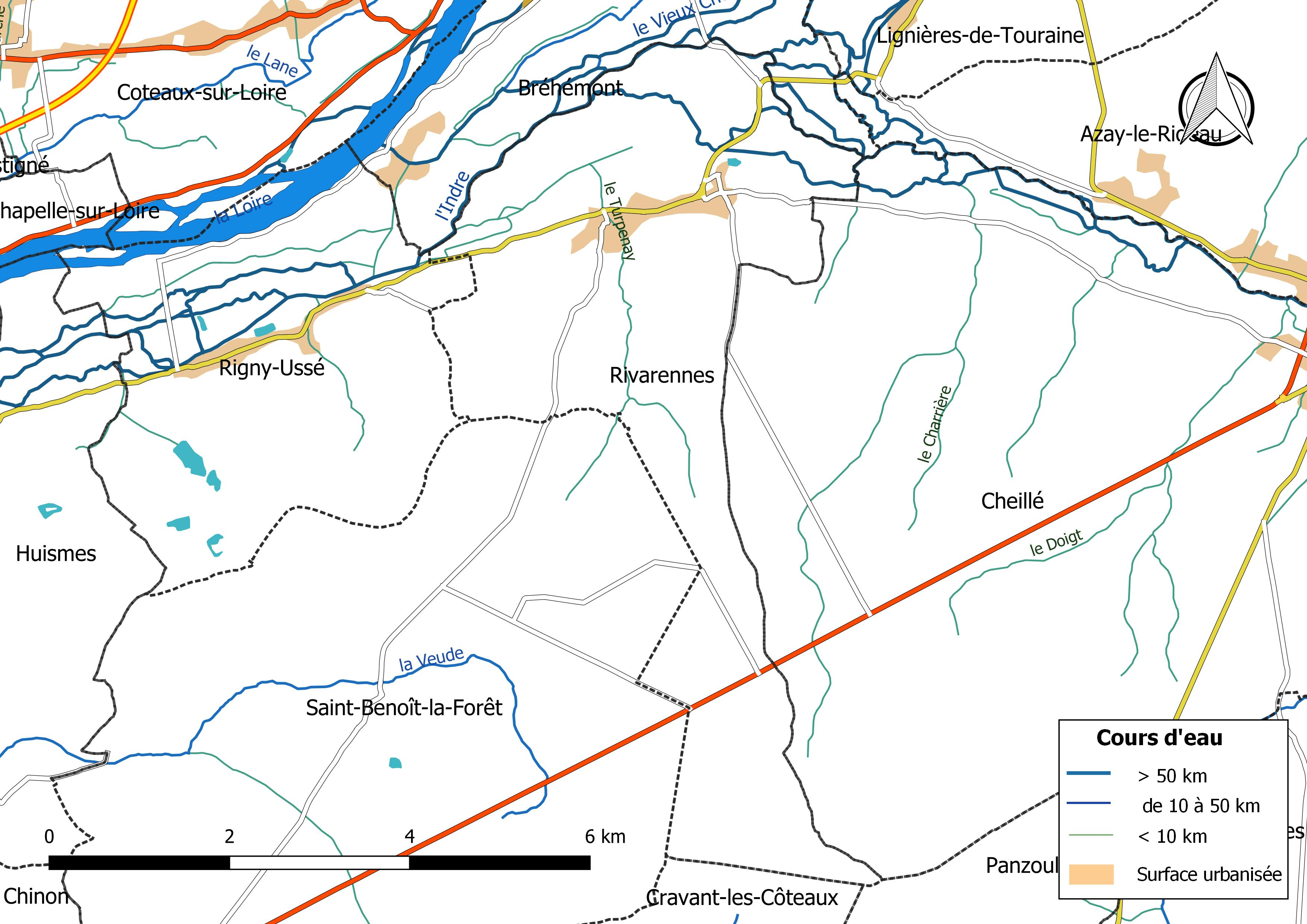 Carte du réseau hydrographique de la commune de Rivarennes (Indre-et-Loire) (France).